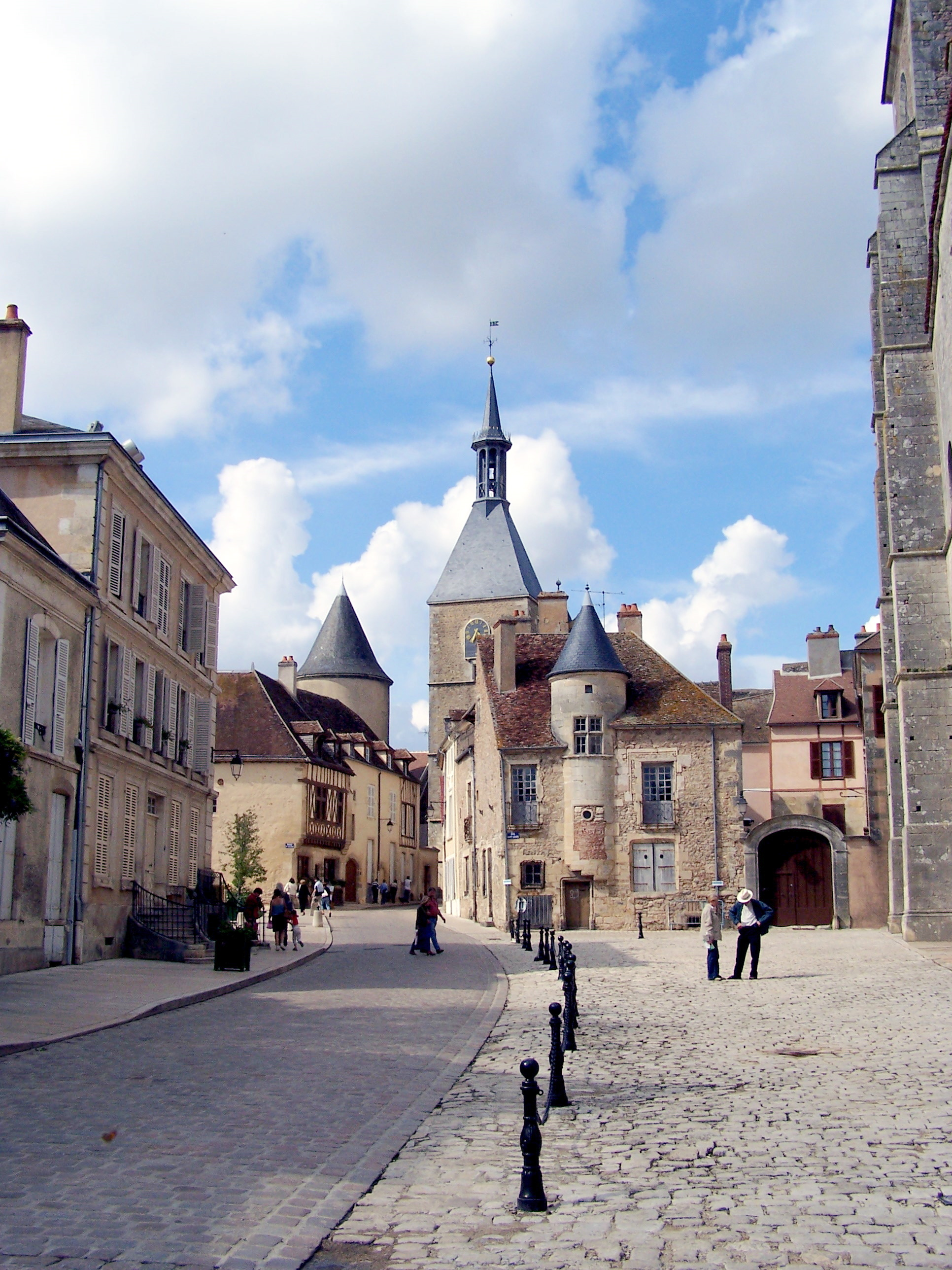 Avallon dans l'Yonne - Tour de l'Horloge et maison des Sires de Domecy sur la Place Saint Lazare. Août 2006